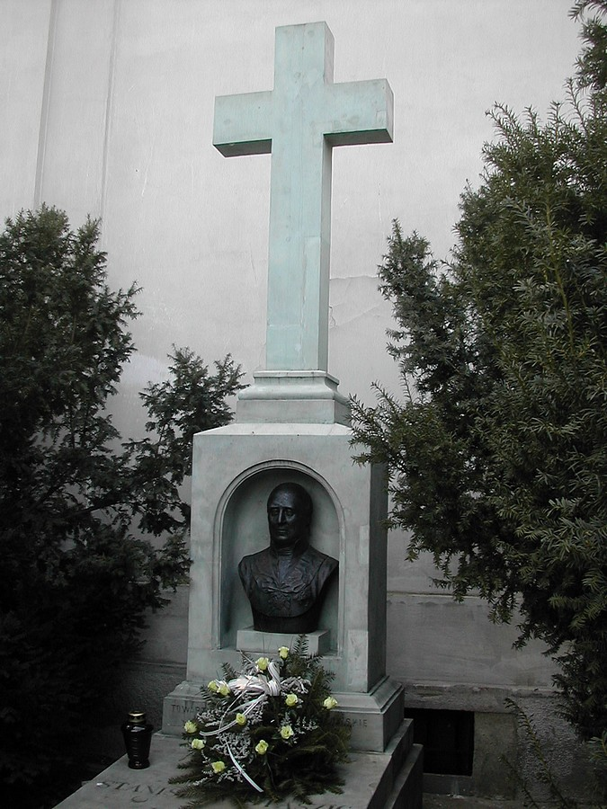 Grób Stanisława Staszica pod kościołem pokamedulskim na Bielanach w Warszawie, 16 stycznia 2005 r.